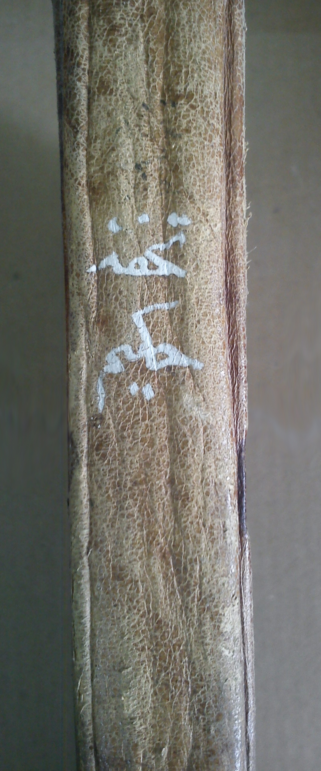 جلد يكی از نسخه‌های چاپ سنگی تحفه حكيم مومن